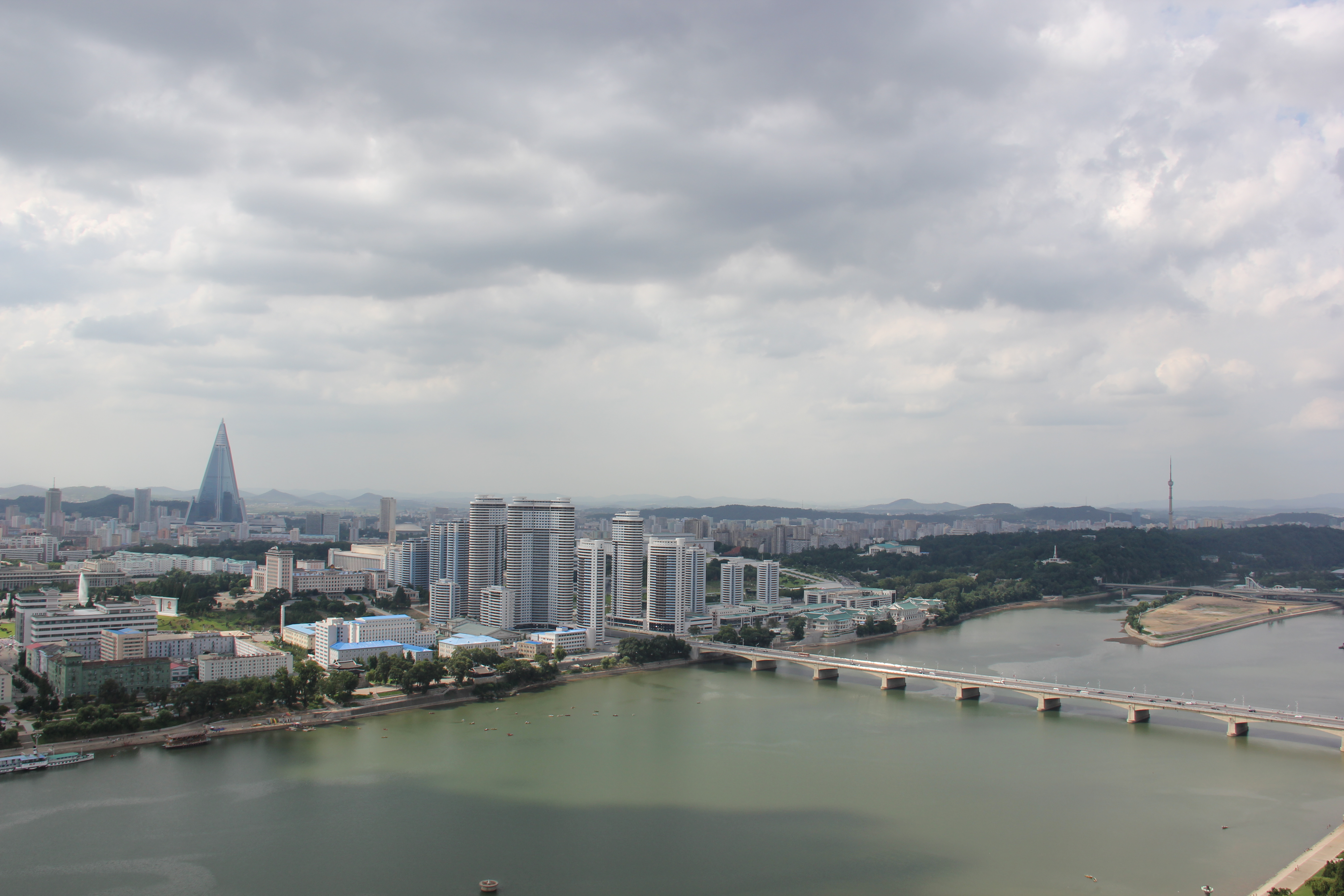 Pyongyang